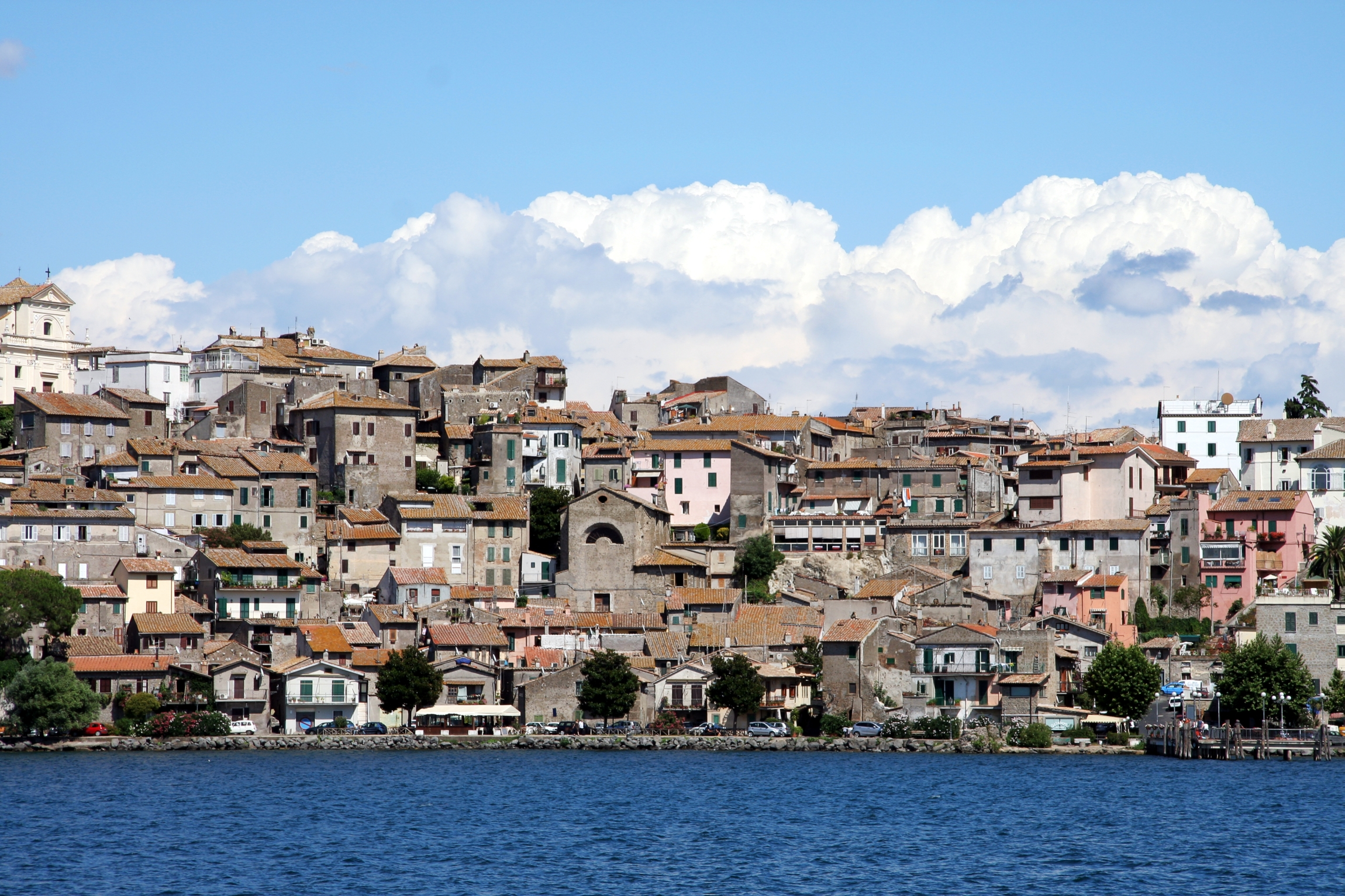 Anguillara Sabazia (Italy)